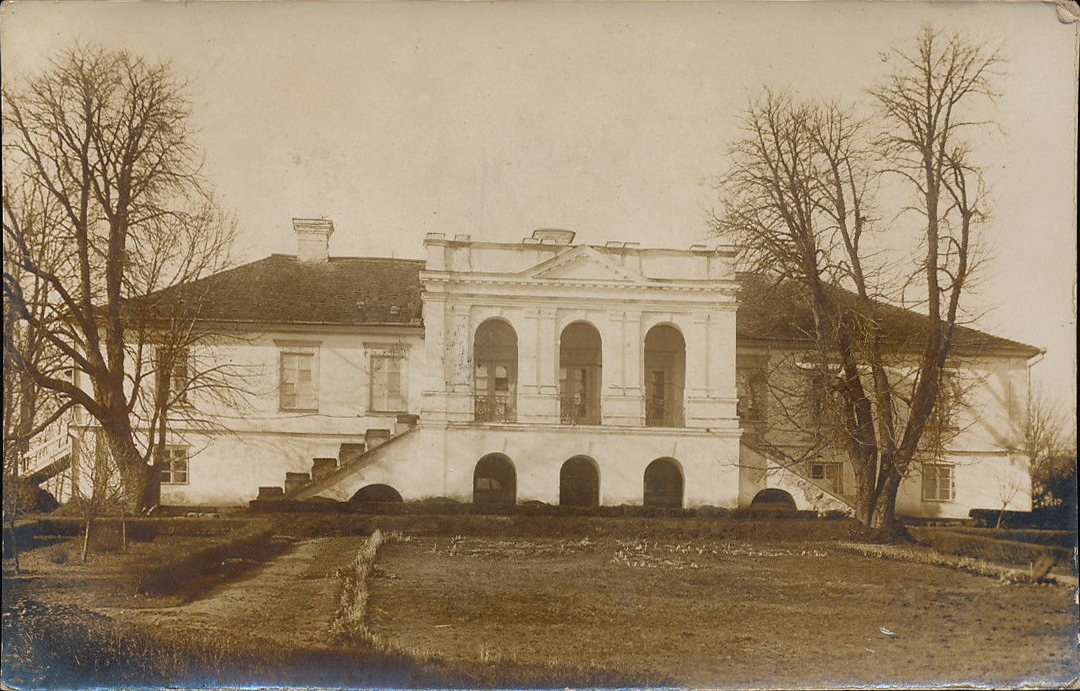 Беларуская (тарашкевіца): Відзы Лаўчынскія (Vidzy Łaŭčynskija), сядзіба Ваўжэцкіх (Vaŭžecki)